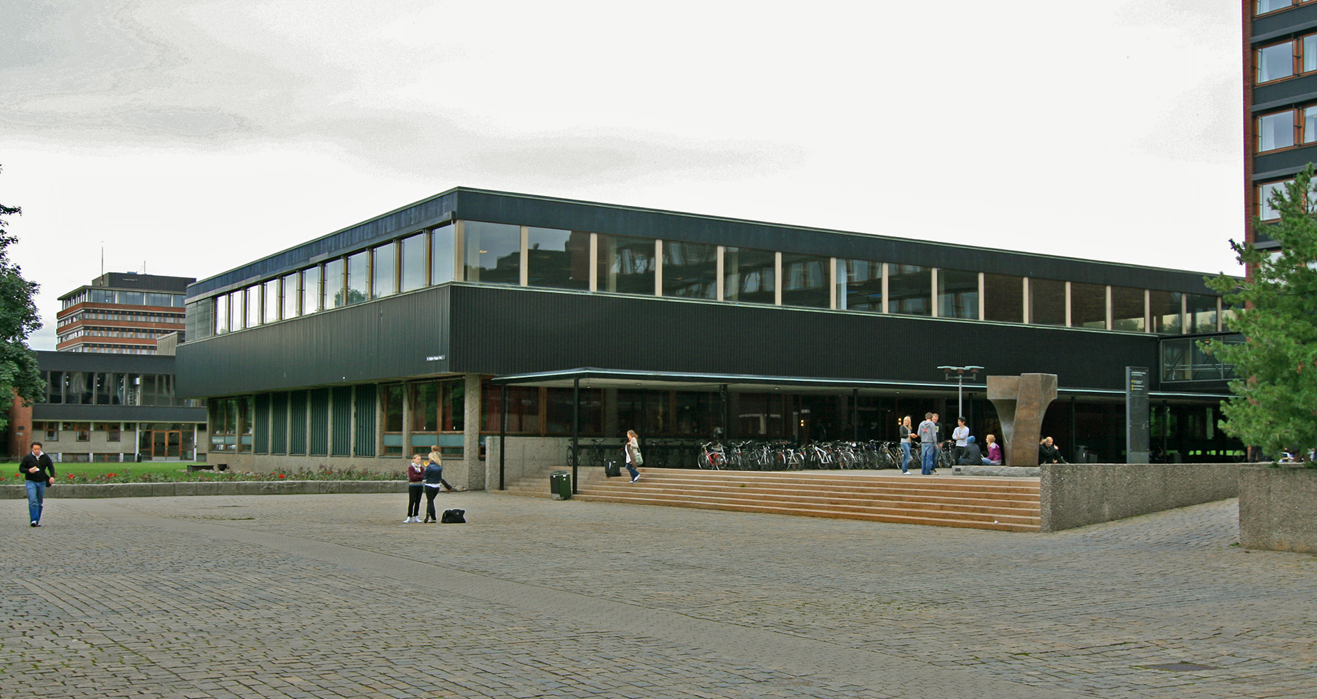 Sophus Bugges hus, Universitetet i Oslo. Oppført 1962; arkitekt Leif Olav Moen